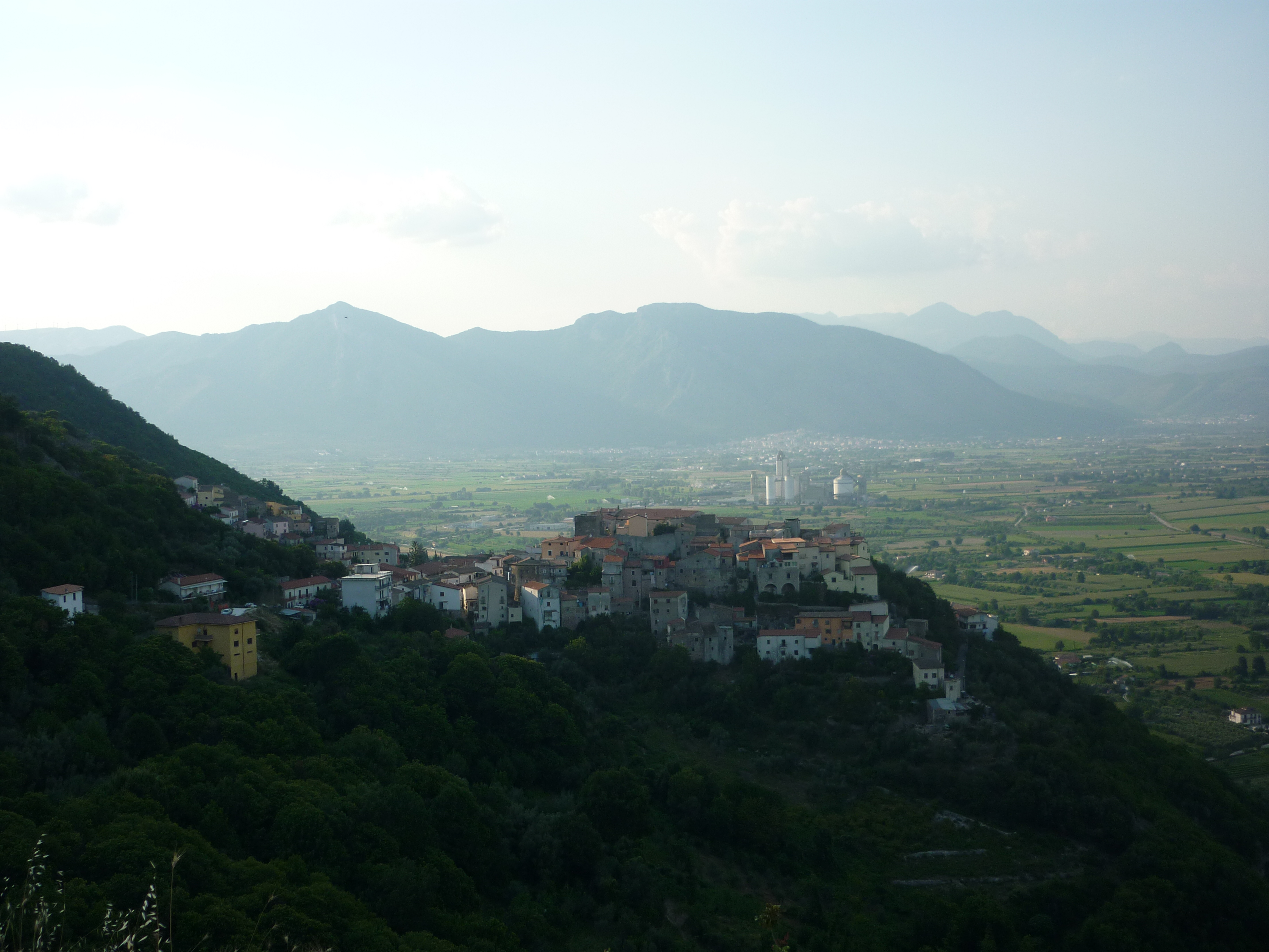 Sesto Campano, provincia di Isernia, regione Molise, Italia